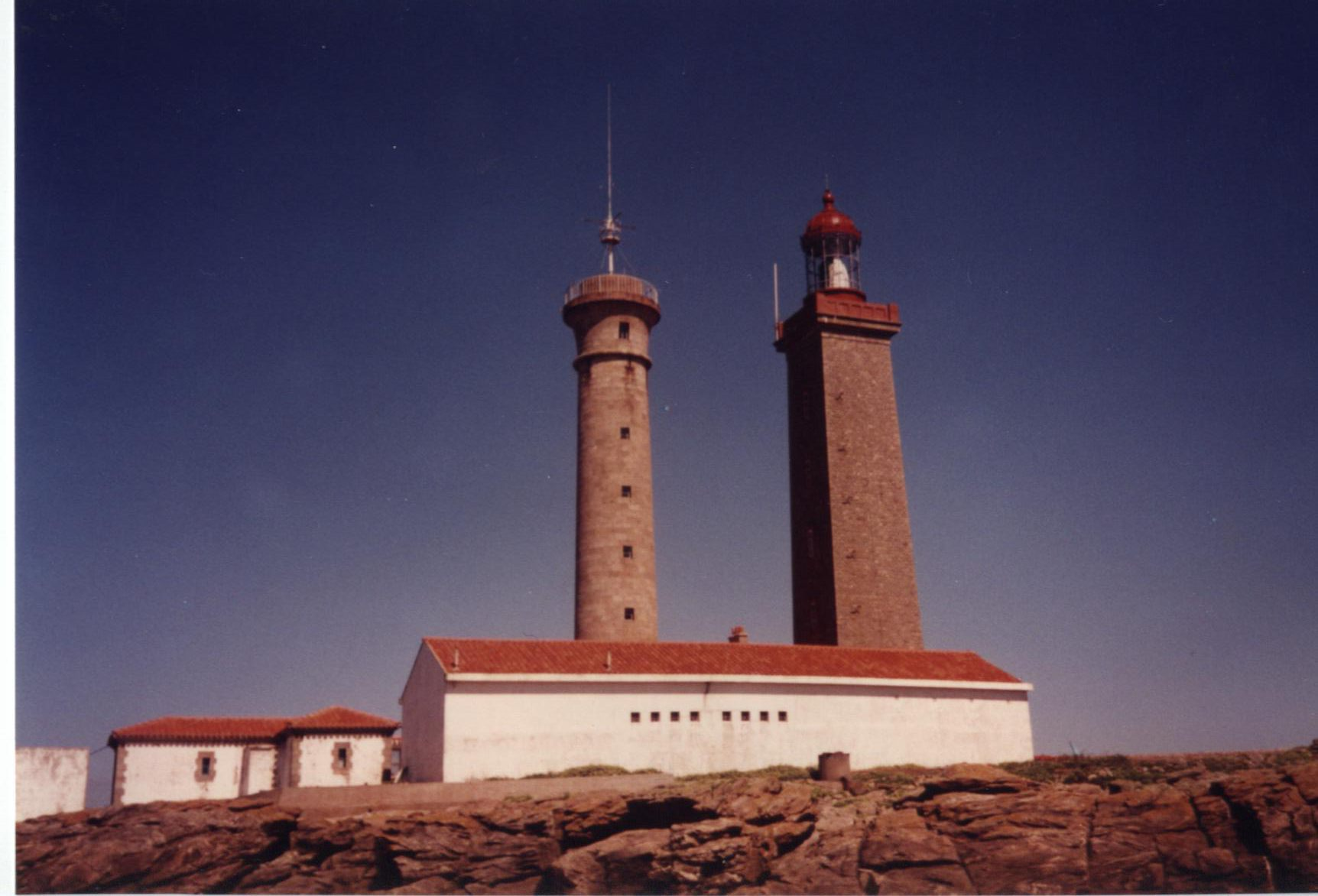 Photo prise en 1996